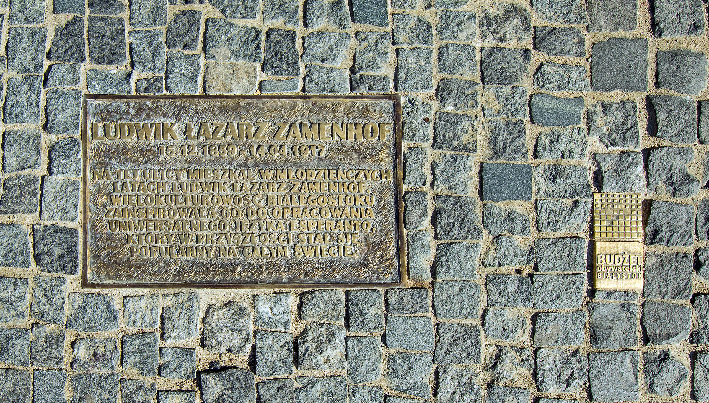 Monumento al juna L. L. Zamenhof en Bjalistoko. Tabuloj.